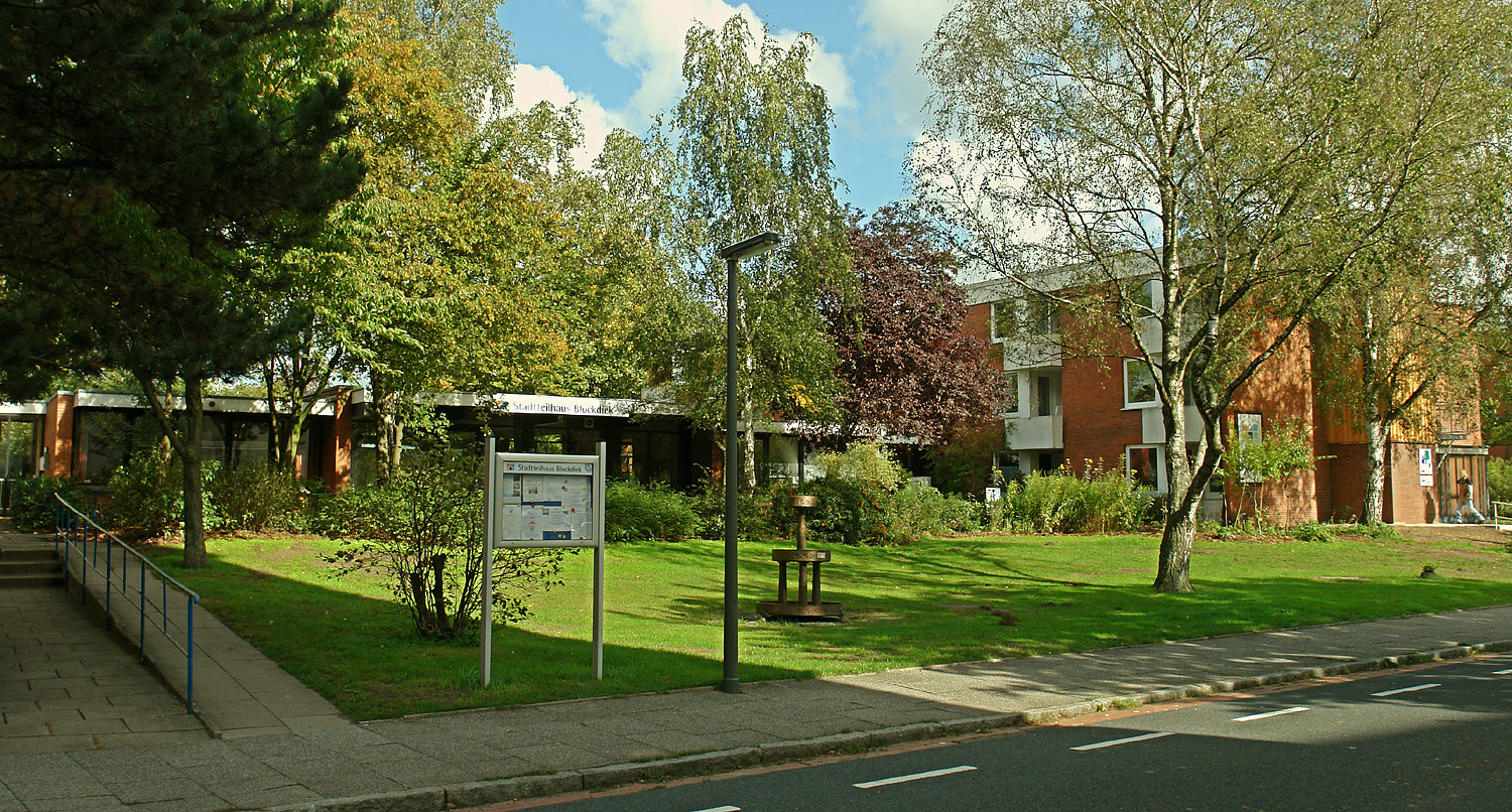 Bremen-Blockdiek:Stadtteilhaus an der Mühlheimer Straße